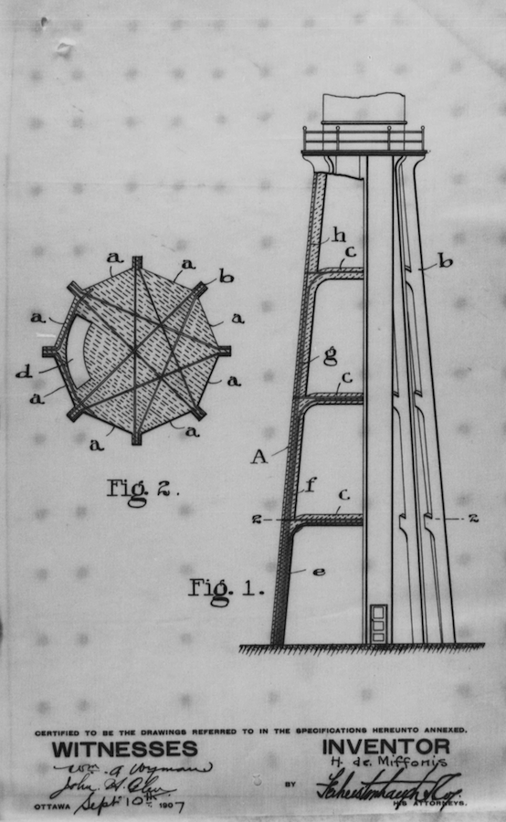 Plan d'une tour de phare en béton armé présenté lors de la demande de brevet de Henri de Miffonis a l'Office de la propriété intellectuelle du Canada (OPIC) en 1907. Brevet 112206 obtenu en juin 1908